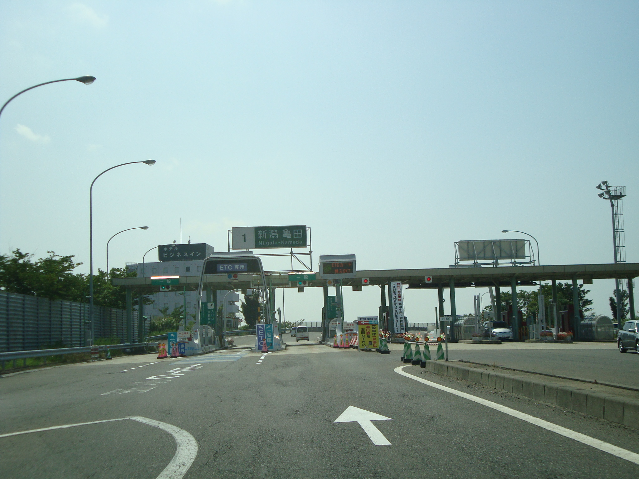 日本海東北自動車道 新潟亀田インターチェンジ料金所